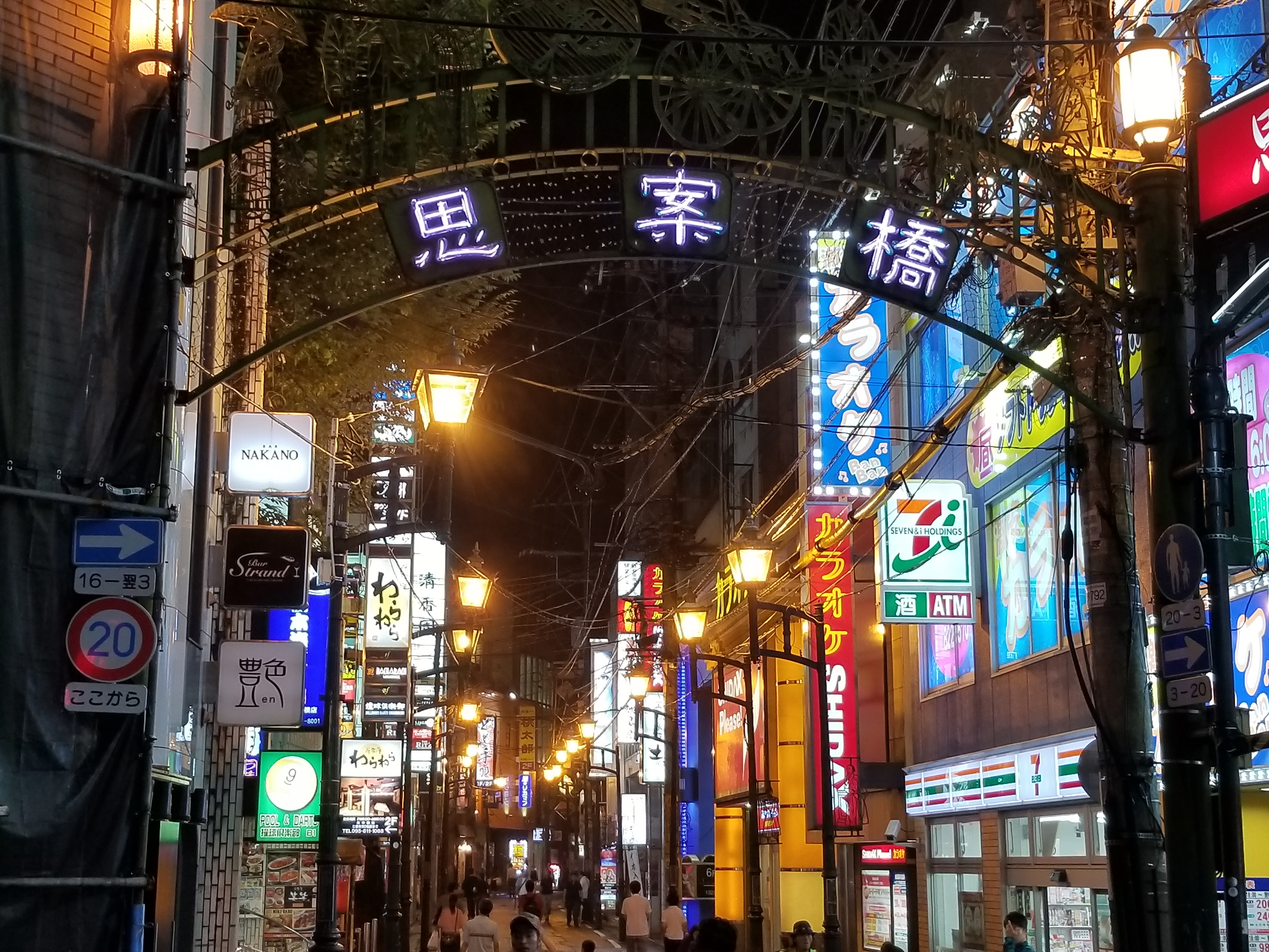 思案橋繁華街の夜景（長崎県長崎市）